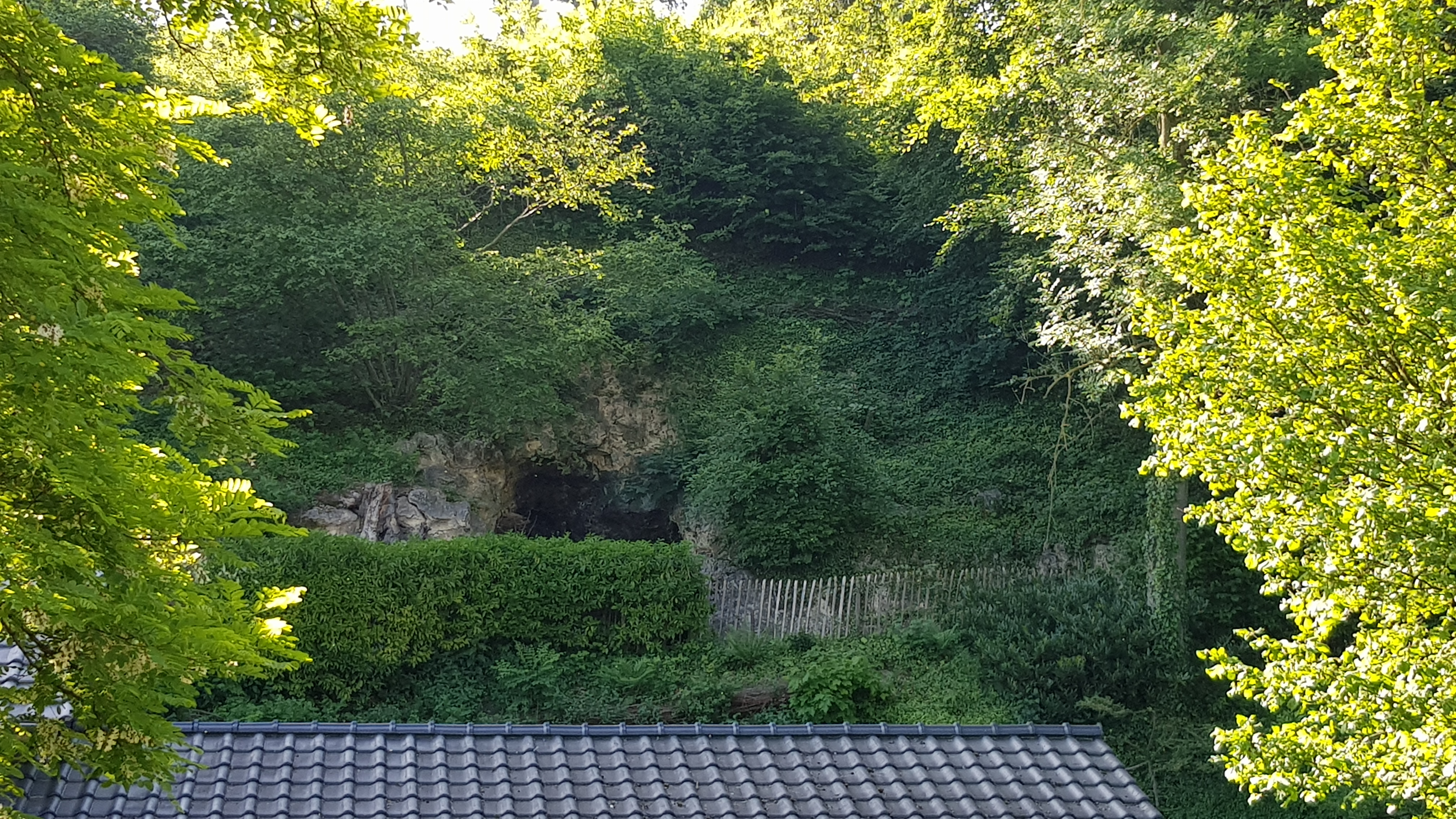 Carolusgroeve, Valkenburg aan de Geul, Nederland